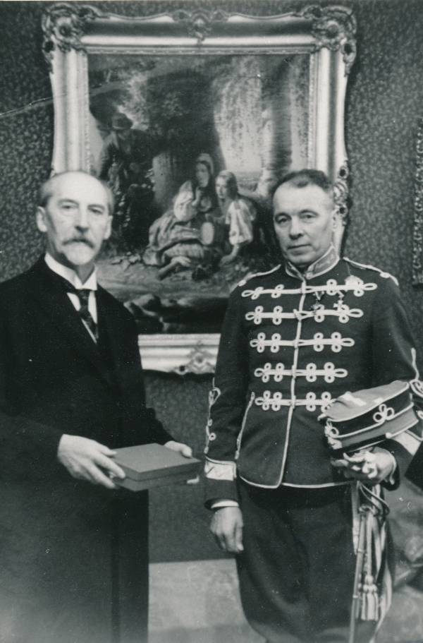 MuuseumikoguFotokoguOlemusfotoOriginaalkoopiaSeisundmääramata